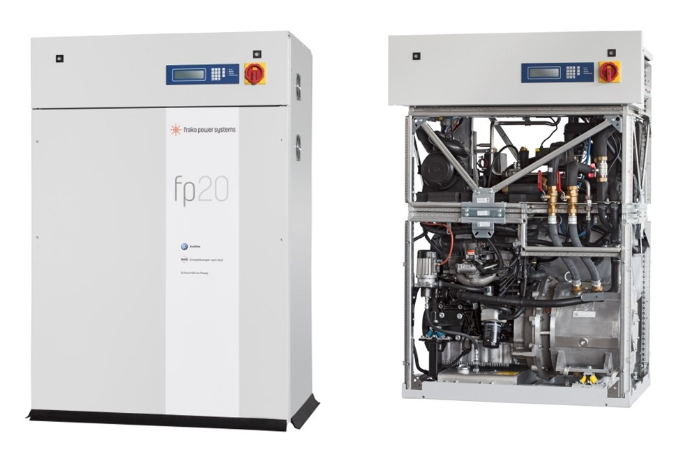 fp20 Blockheizkraftwerk, links mit, rechts ohne Geräteverkleidung